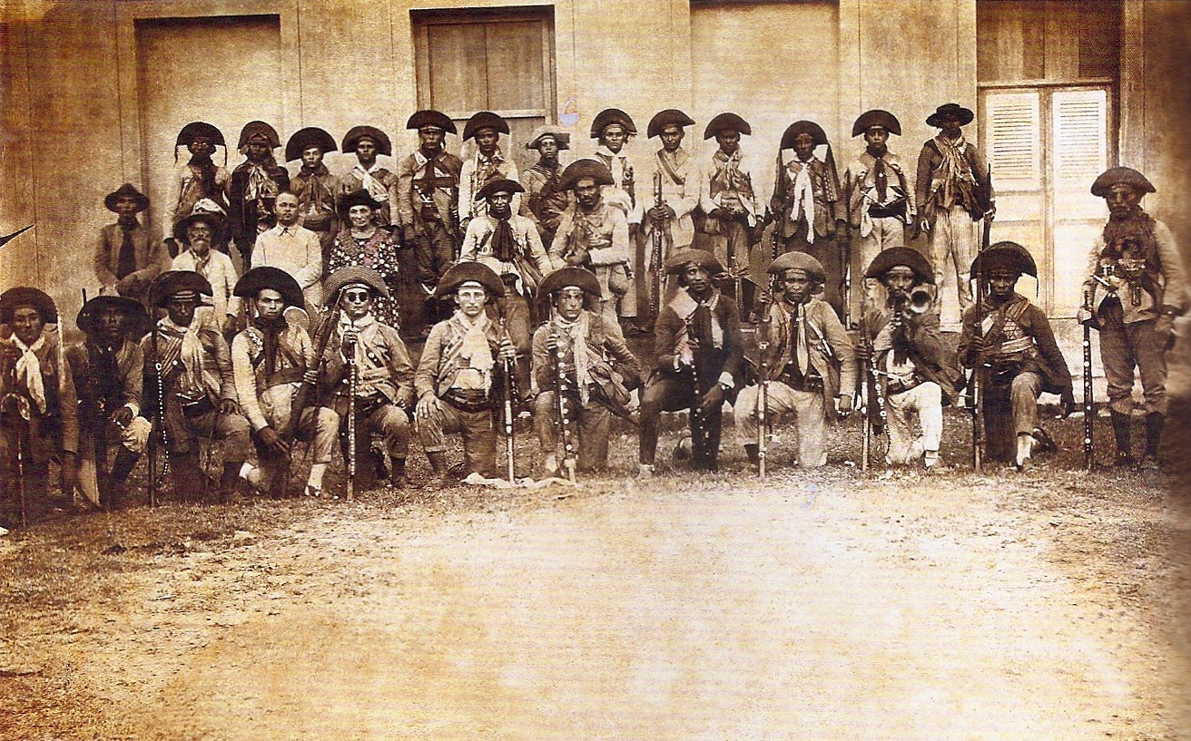 Lampião e seu grupo. Fotografia P&B, 10 x 18 cm. Acervo do Museu do Ceará - Fortaleza, CE, Brasil. Foto da passagem do grupo por Limoeiro do Norte, CE, em 1927, pouco antes de serem presos em Mossoró, Rio Grande do Norte.